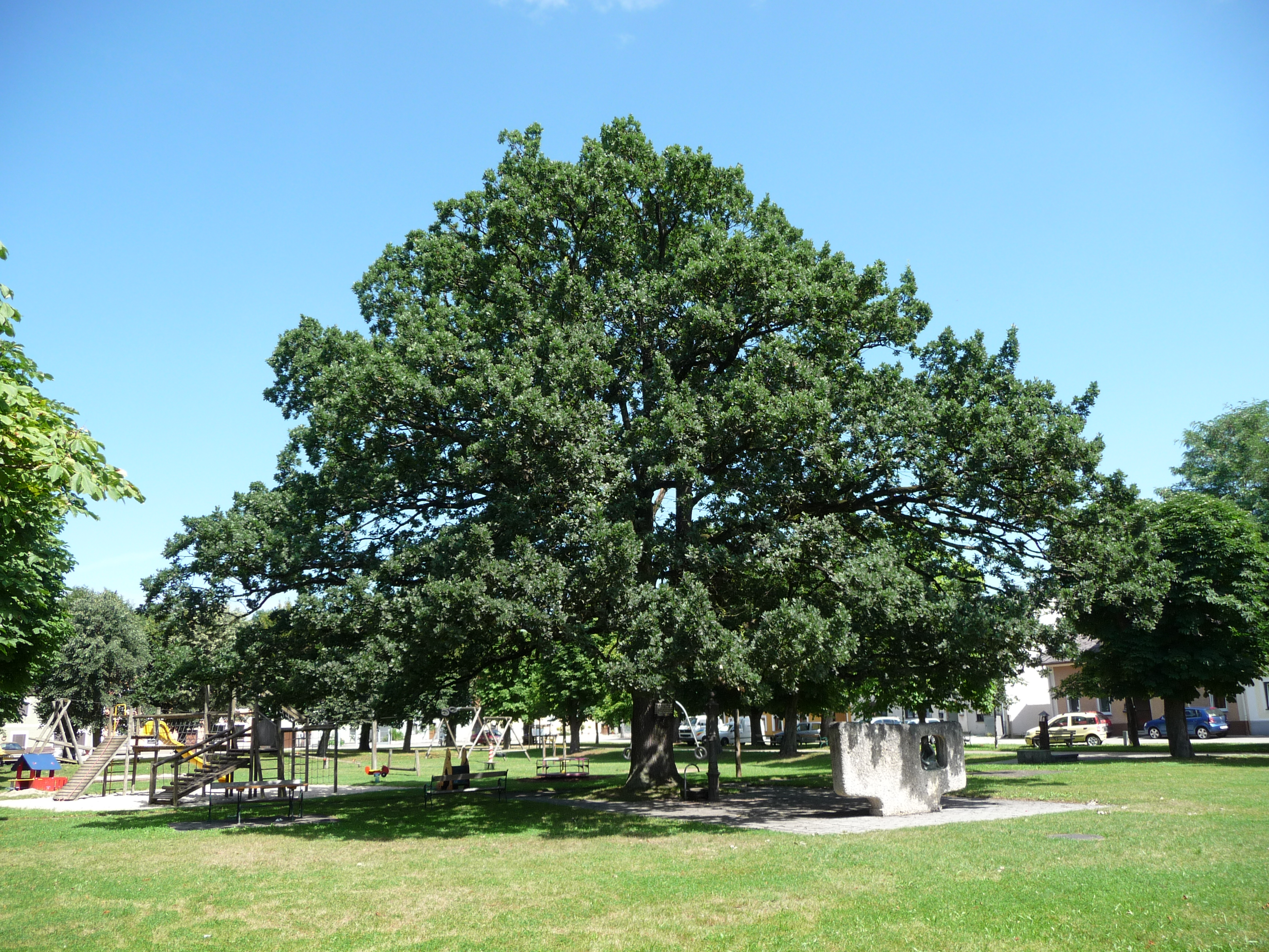 Altheim, Weinlechner-Eiche This media shows the natural monument in Upper Austria with the ID nd047.